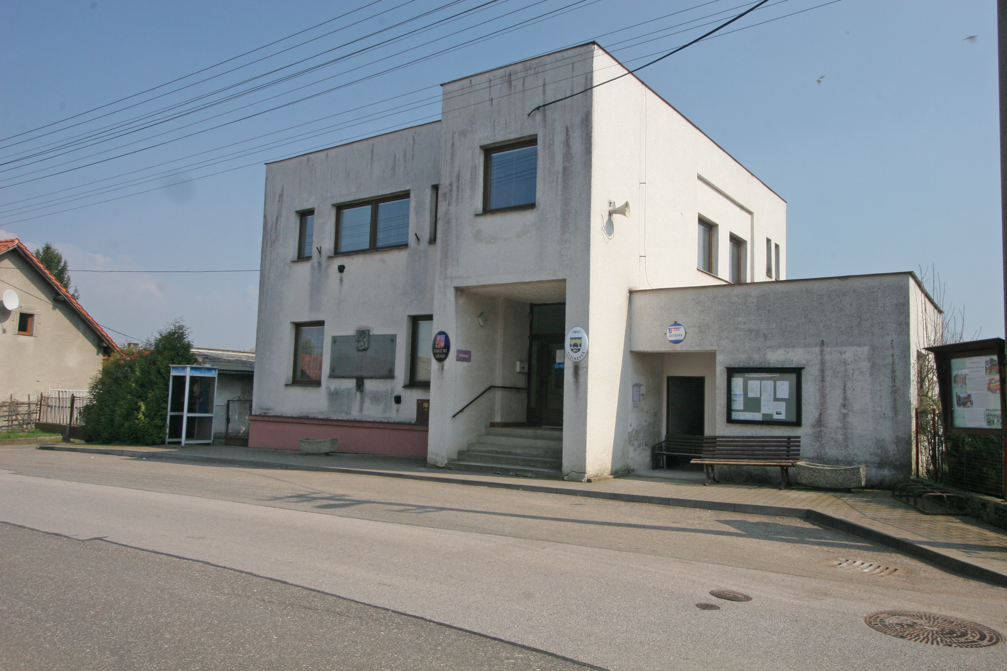 Vitiněves obecní úřad